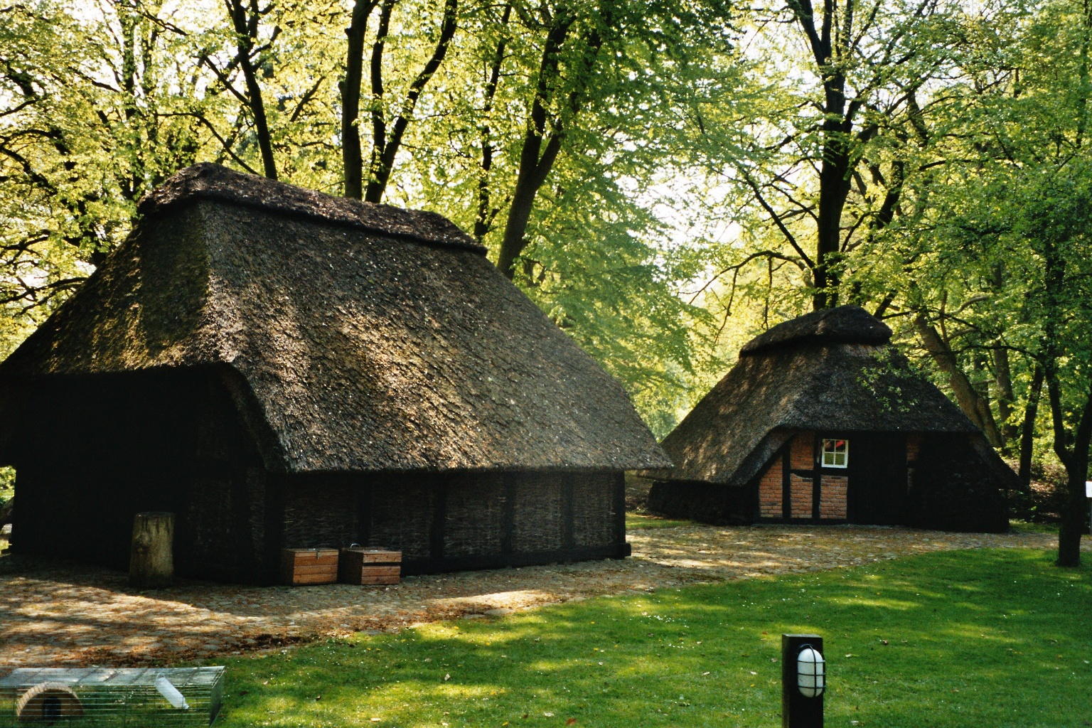 Bremerhaven: Geestbauernhof im Speckenbütteler Park